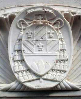 Stemma dalla tomba del cardinale Gaetano Bedini.